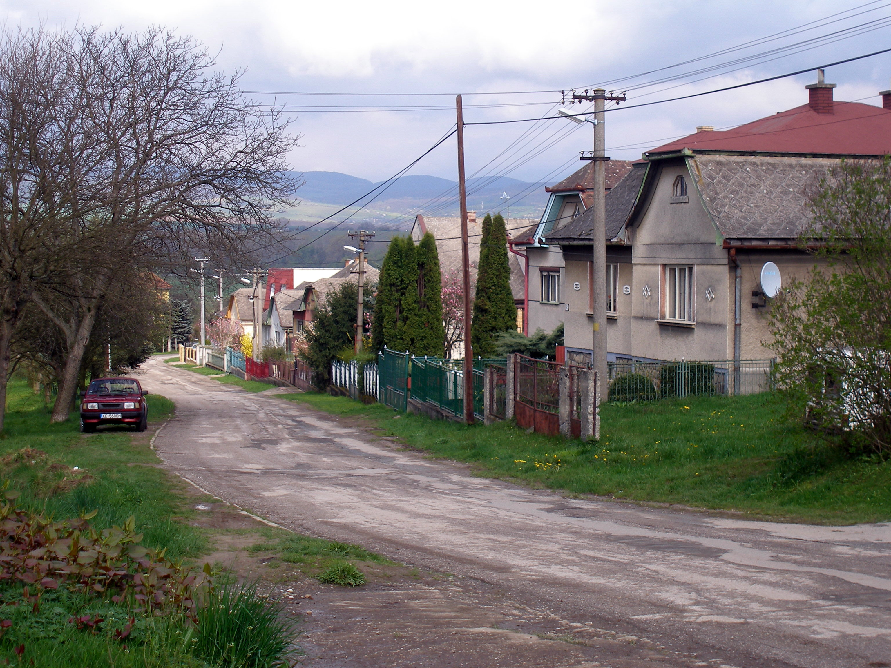 Obec Janovík v okrese Prešov, región Šariš